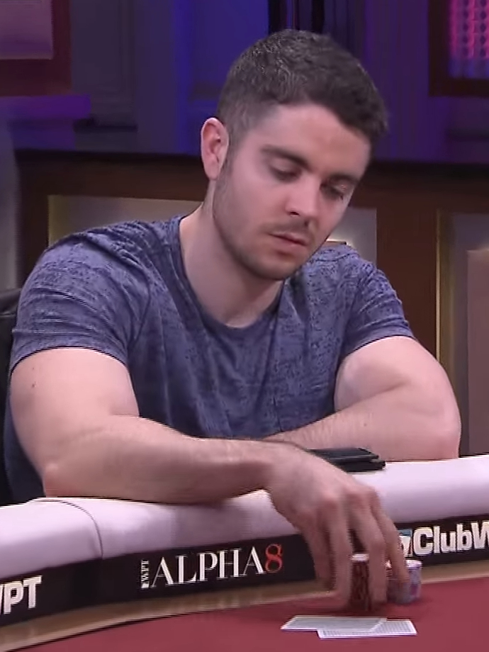 Ben Tollerene beim Season 2 WPT Alpha8 Las Vegas